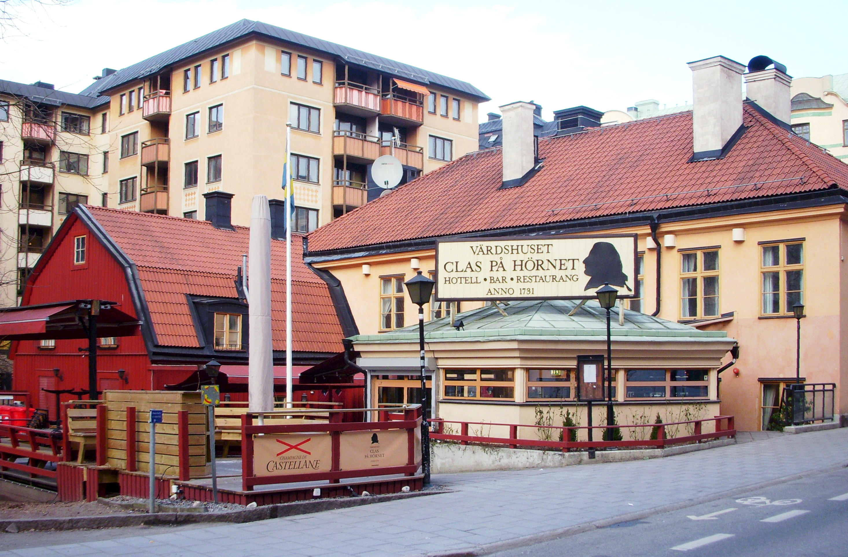 Clas på Hörnet på Norrmalm i Stockholm